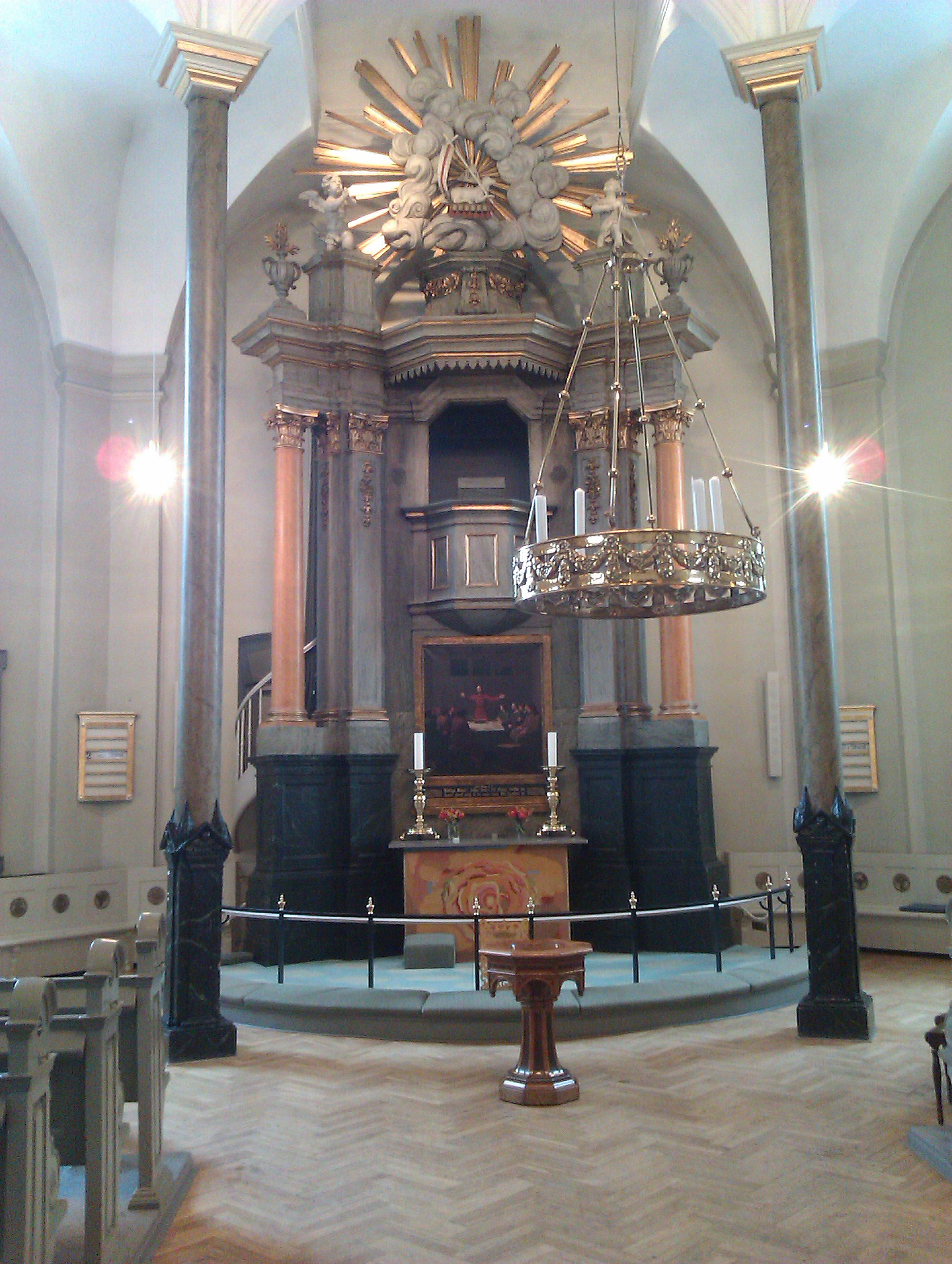 Alter med prædikestol i Frederiksberg Kirke, Frederiksberg, Sjælland